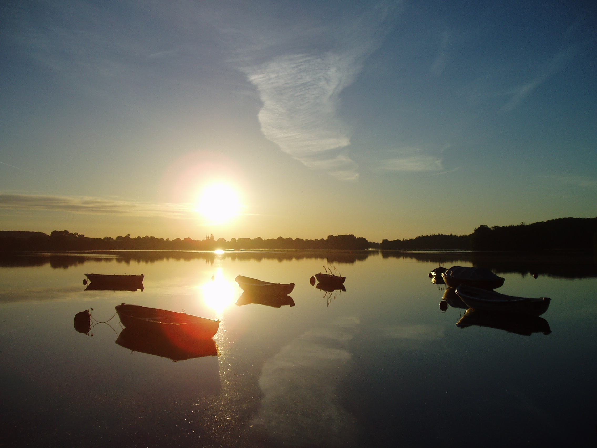 Sonnenaufgang über dem Schöhsee